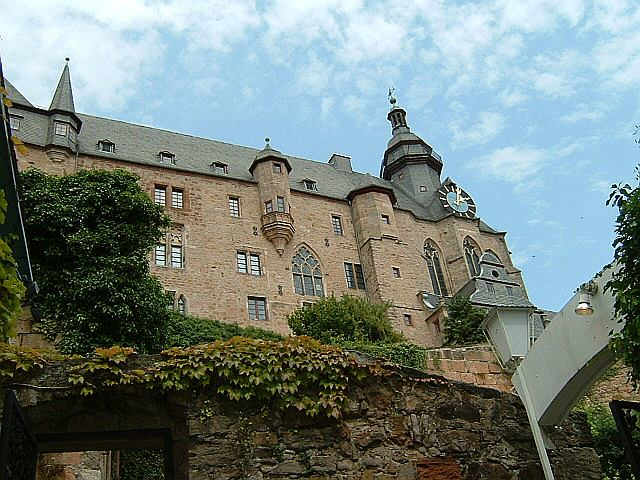 eigene Aufnahme vom Schloss Marburg am 23.7.2004 LIZENZ